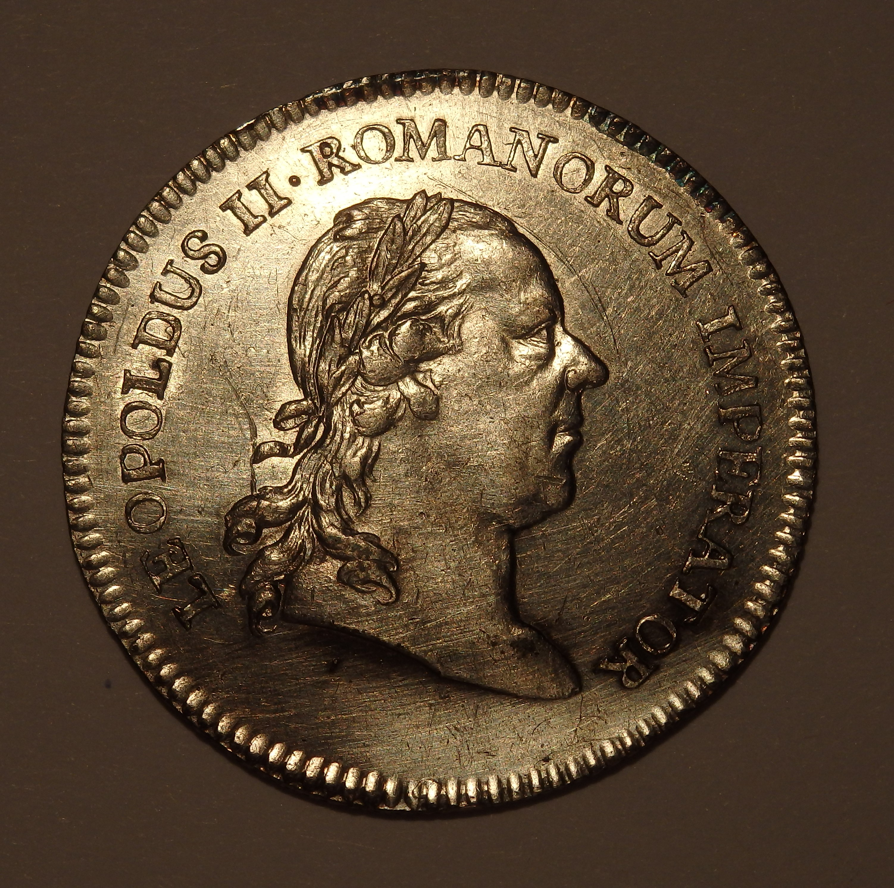 Kopfbild Leopolds II., Rückseite Silberabschlag